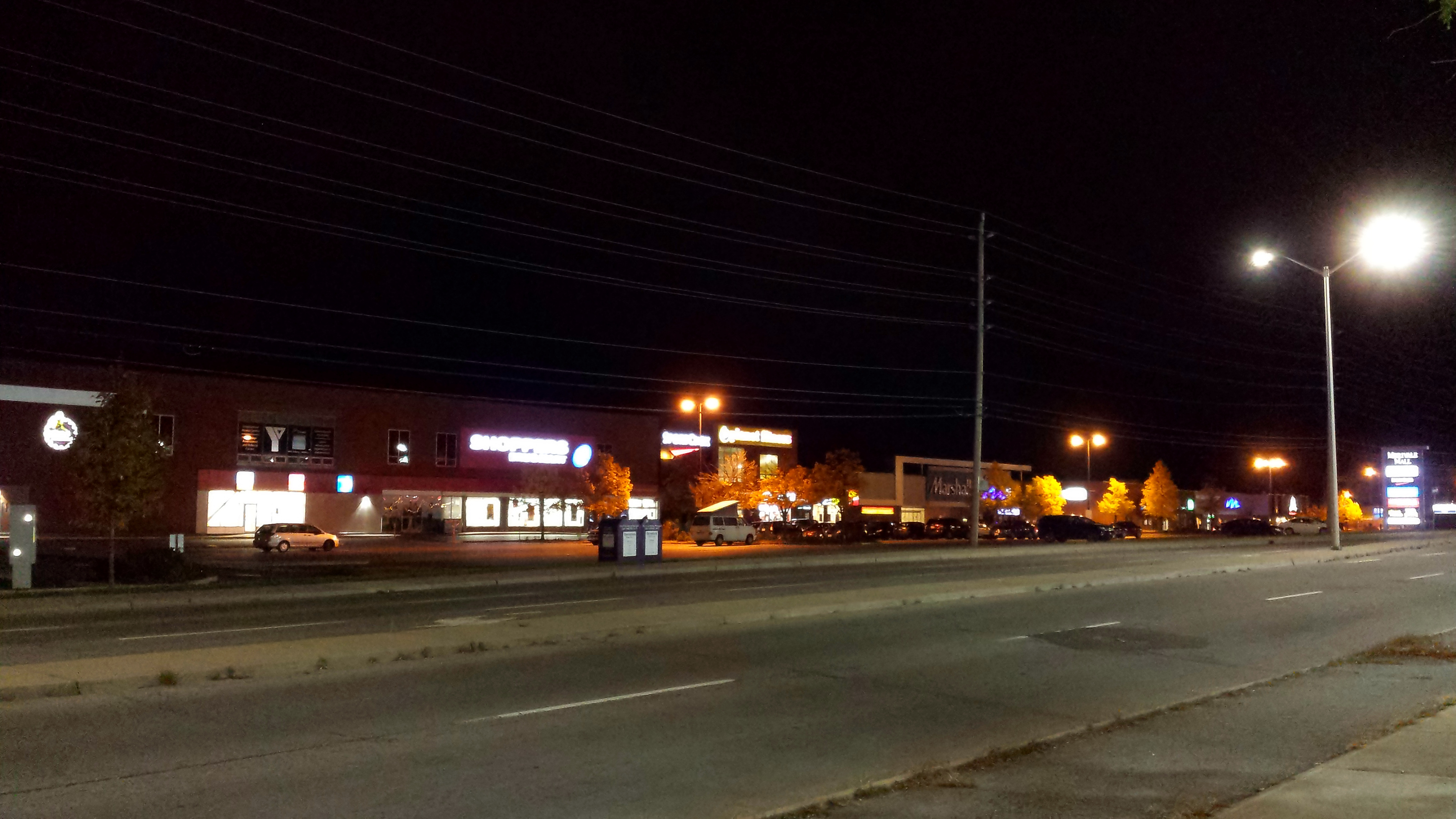 Merivale Mall, Ottawa, Ontario, Canada